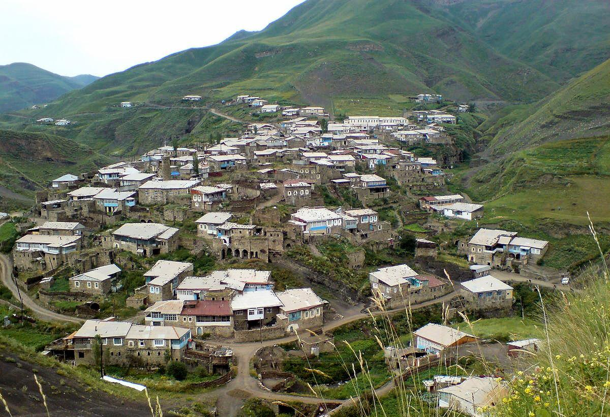 село Буркихан, Агульский район